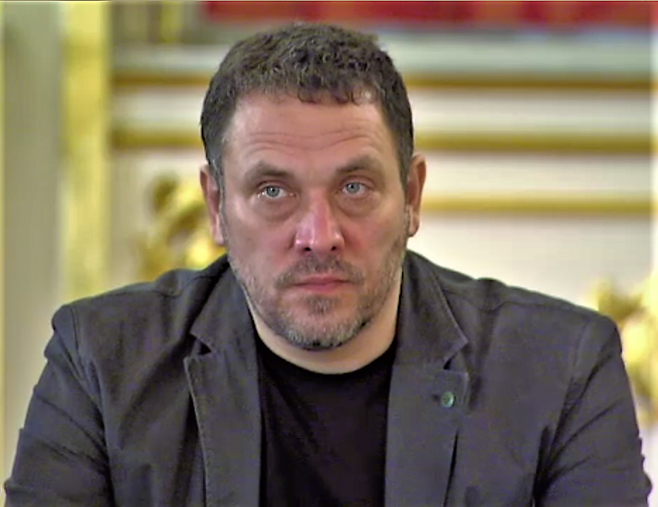 Заседание Совета по развитию гражданского общества и правам человека